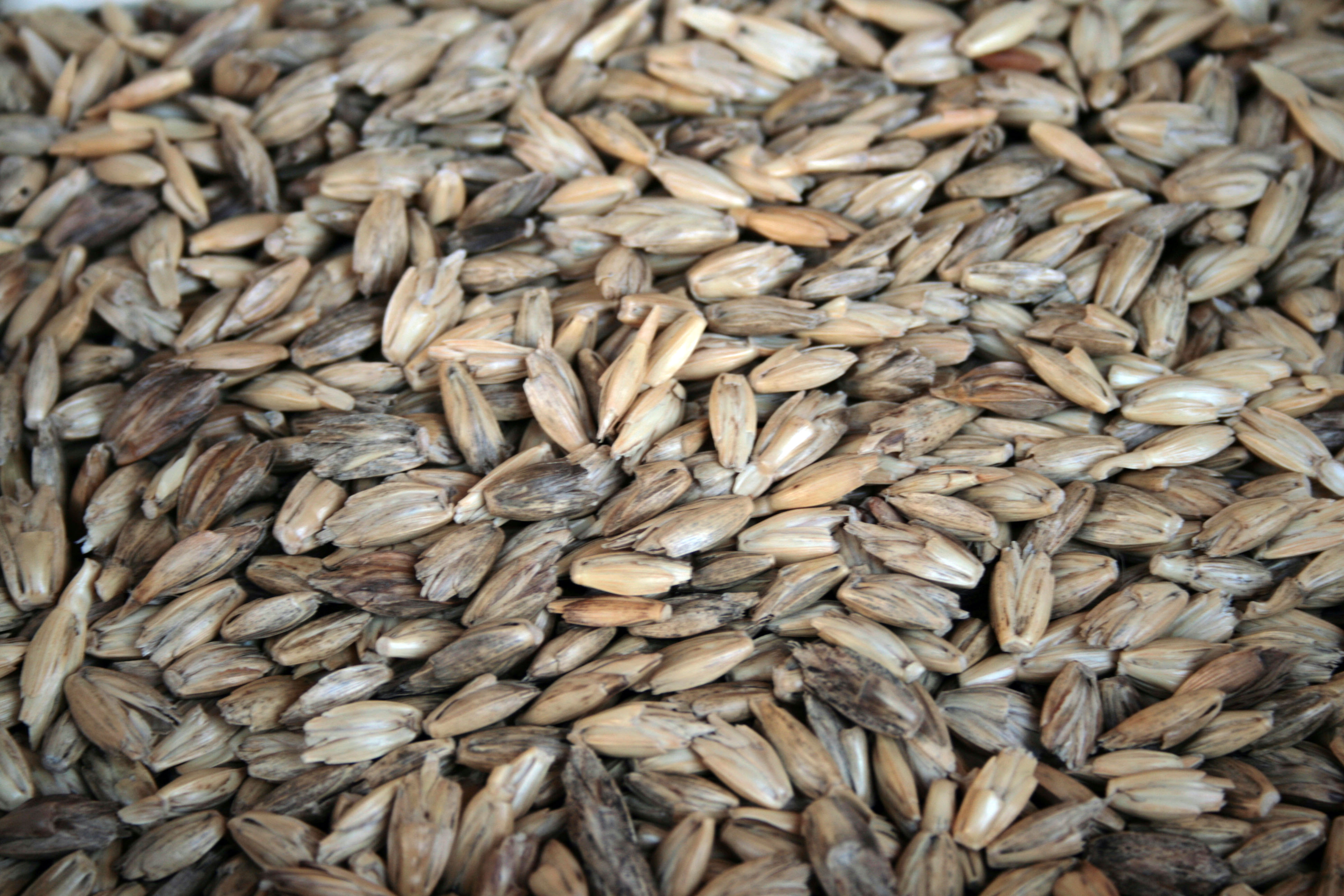 Trigo de Escanda (Asturiana) Pola de Lena